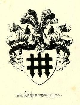 Wappen derer „von Schwarzkoppen” im Königreich Hannover/Herzogtum Braunschweig (1852), abstammend von Hans Swartekop († 1511), Bürger in Braunschweig, seit 1700, ähnlich dem der 1696 ausgestorbenen altmärkischen „von Schwartzkopf”: In Silber ein schwarzes Fallgatter, auf dem Helm mit schwarz-silbernen Decken sechs (schwarz, silbern, schwarz, silbern, schwarz, silbern) Straußenfedern.